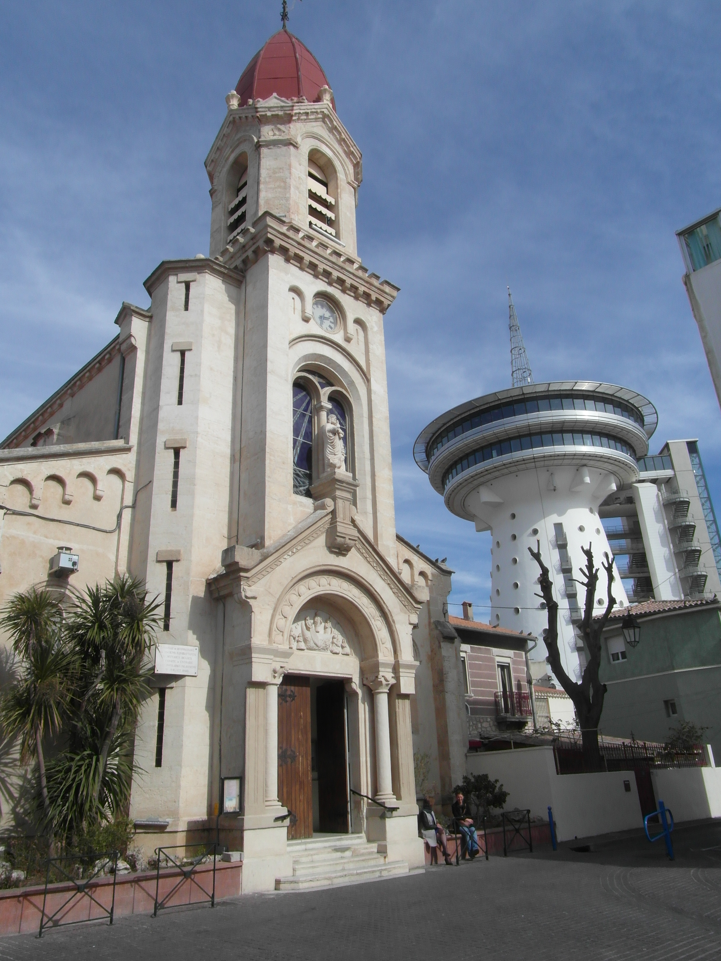 L'église de Palavas et le phare de la Méditerranée